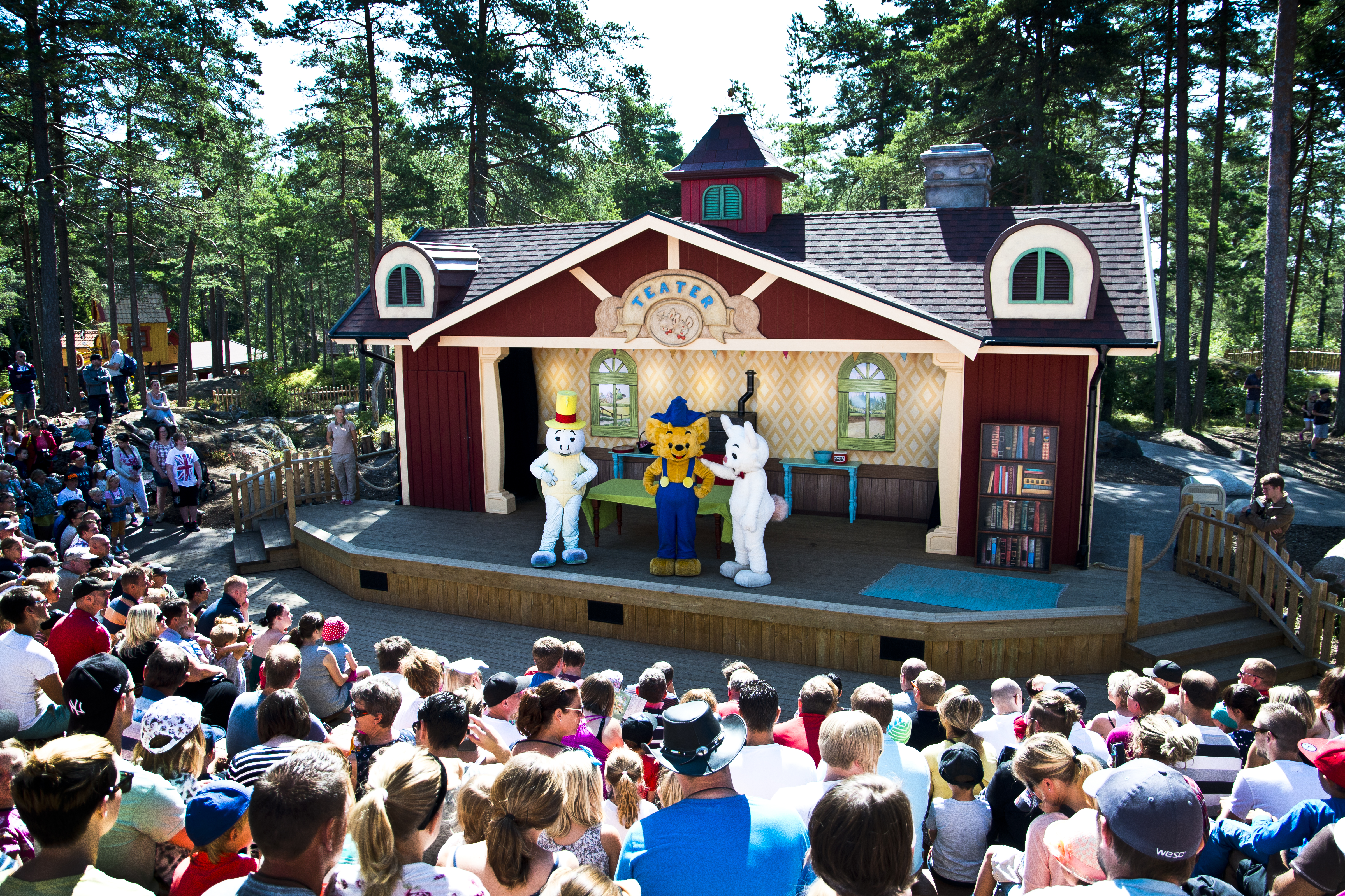 Nyöppnade Bamses värld 2015 på Kolmårdens Djurpark utanför Norrköping